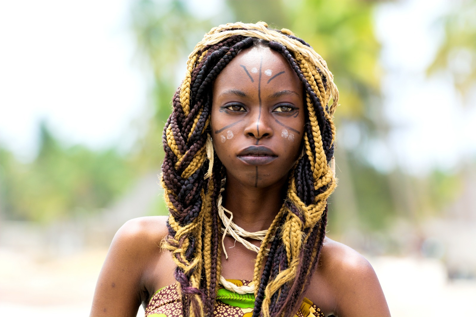 Kiswahili: majani ya mgomba yamefungwa kichwani, yametengenezewa hereni na mkufu wa shingoni This is an image of Cultural Fashion or Adornment from Tanzania